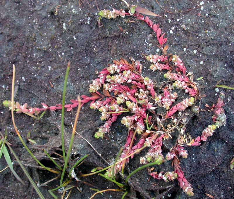 Illecebrum verticillatum